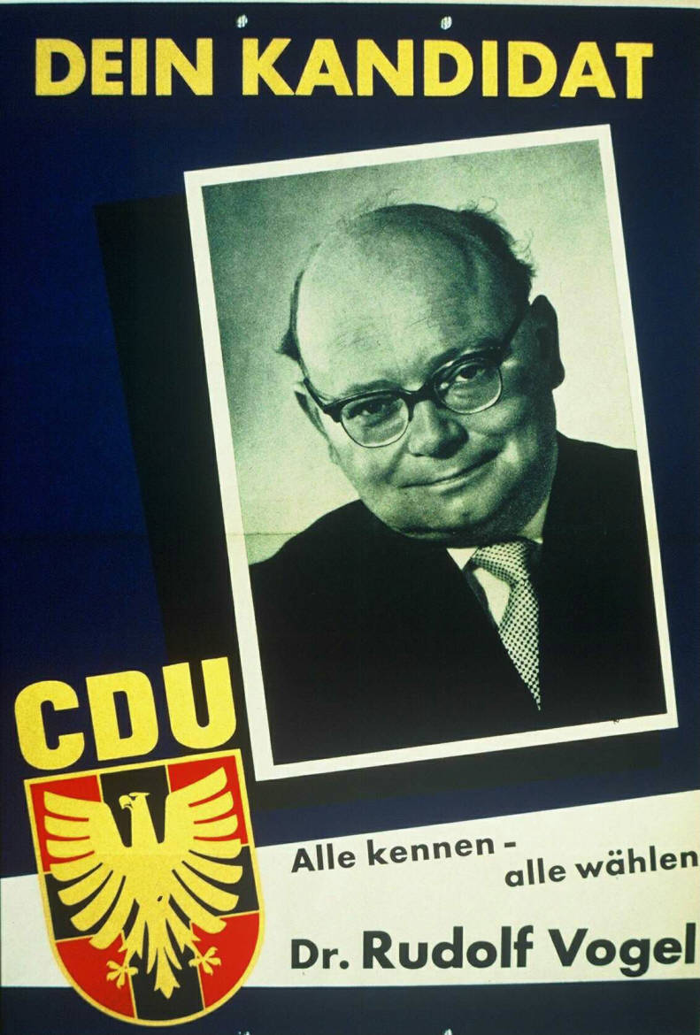 Dein Kandidat Alle kennen - alle wählen Dr. Rudolf Vogel Abbildung: Porträtfoto Kommentar: evtl. BTW 1957? Plakatart: Kandidaten-/Personenplakat mit Porträt Objekt-Signatur: 10-001: 548 Bestand: Plakate zu Bundestagswahlen (10-001) GliederungBestand10-18: Plakate zu Bundestagswahlen (10-001) » Die 2. Bundestagswahl am 6. September 1953 » CDU » Mit Porträtfoto Lizenz: KAS/ACDP 10-001: 548 CC-BY-SA 3.0 DE